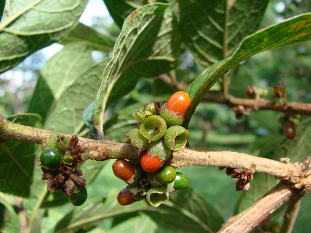 Aegiphila lhotzkiana - LAMIACEAE Parque Olhos D' Água - Brasília - Distrito Federal - Brasil.